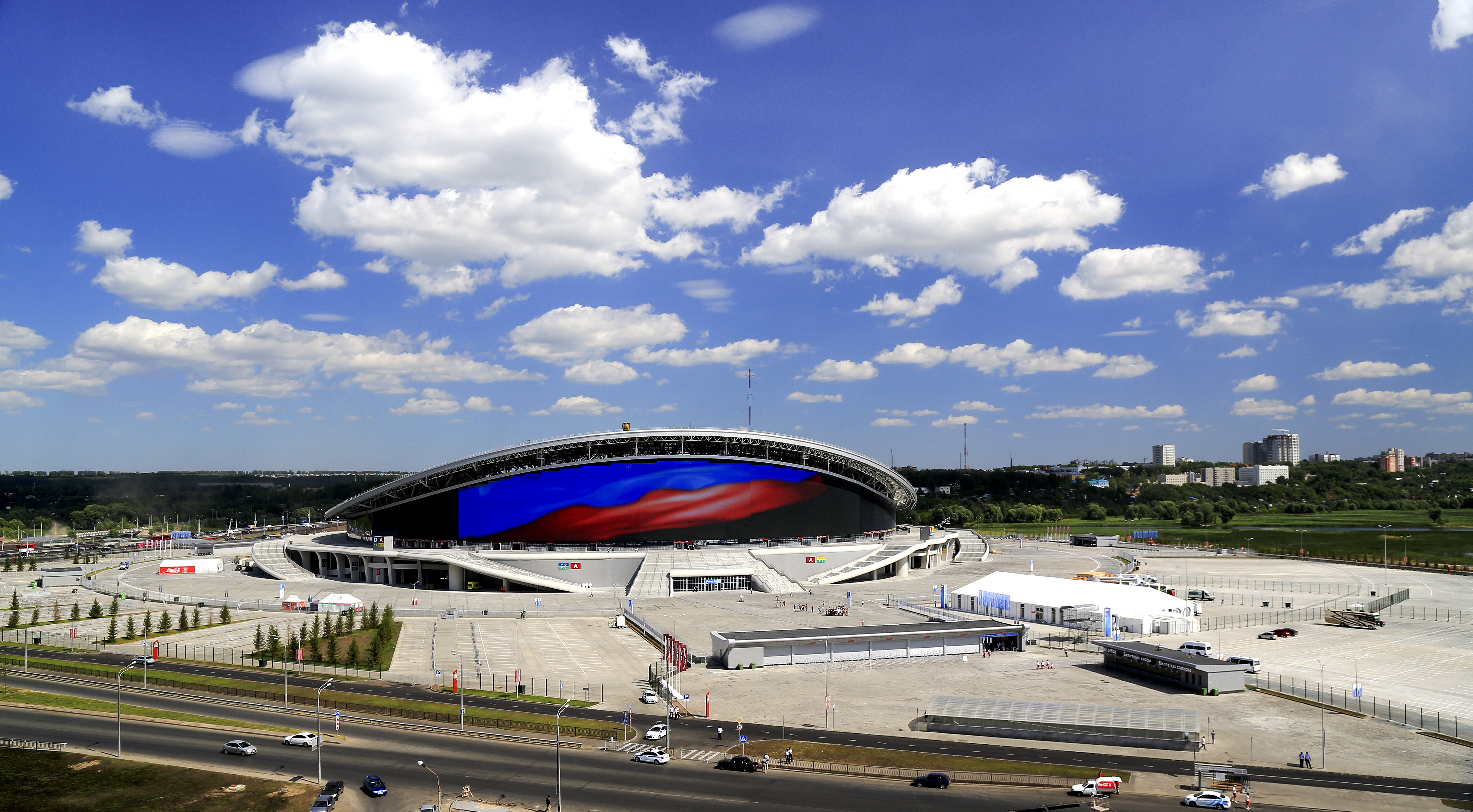 Вид на стадион Казань Арена